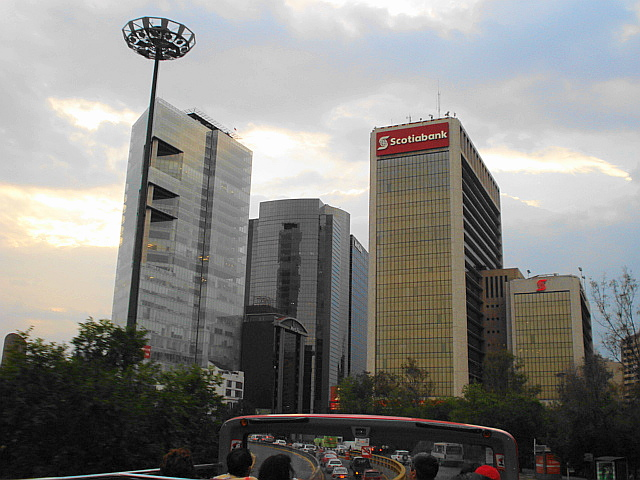 Reforma 115 y periferico en la Ciudad de México.